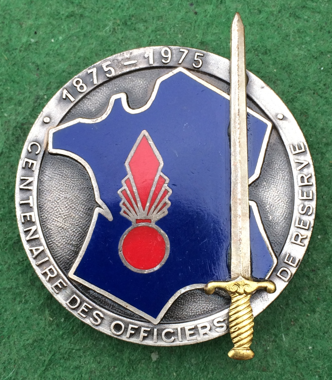 Insigne de la promotion EOR du 3e bataillon de l'ESM Saint-Cyr Coëtquidan de 1975, évoquant le 100e anniversaire de la loi du 13 mars 1875 donnant un statut et créant les officiers de réserve (Drago - Paris)